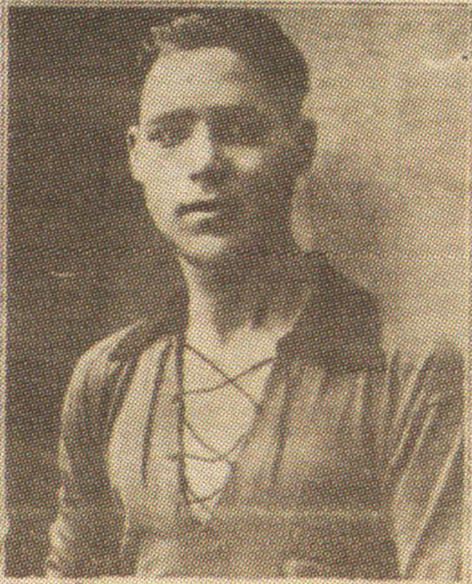 Ο Νίκος Αγγελάκης παίκτης του Άρη